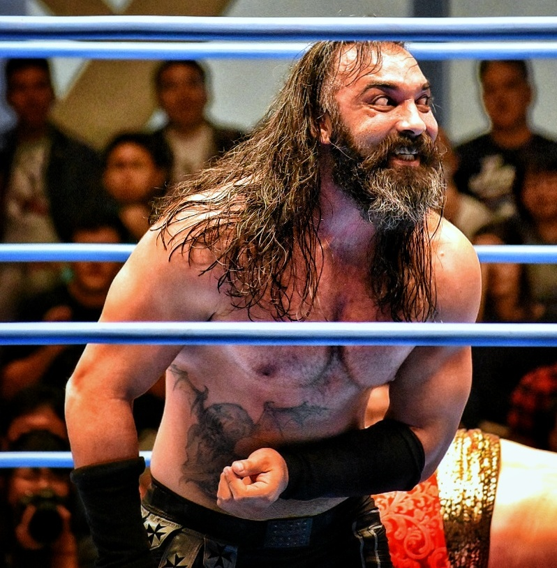 マルタのプロレスラー